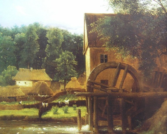 «Водяная мельница в Качановке».